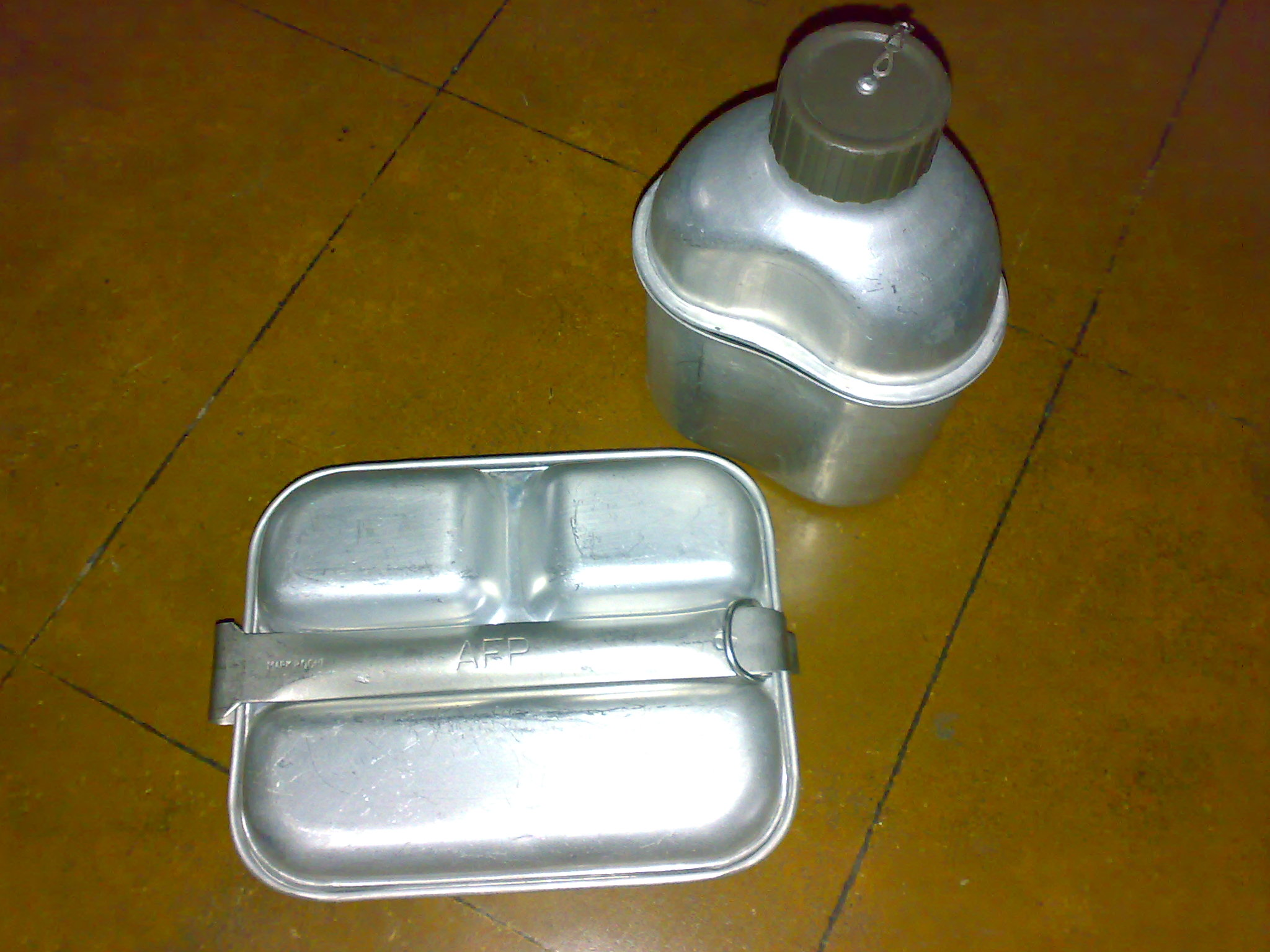 AFP mess kit; similar to US military mess kits.